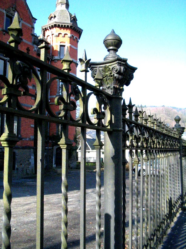 Grille bordant la Villa Steisel, place du Châtelet à Malmedy. Lors de l'aménagement de cette place, elles ont été démontées. Le permis d'urbanisme, octroyé à la Ville de Malmedy, imposait leur remise en place. En juin 2018, aucune grille n'avait encore replacée devant cette villa.